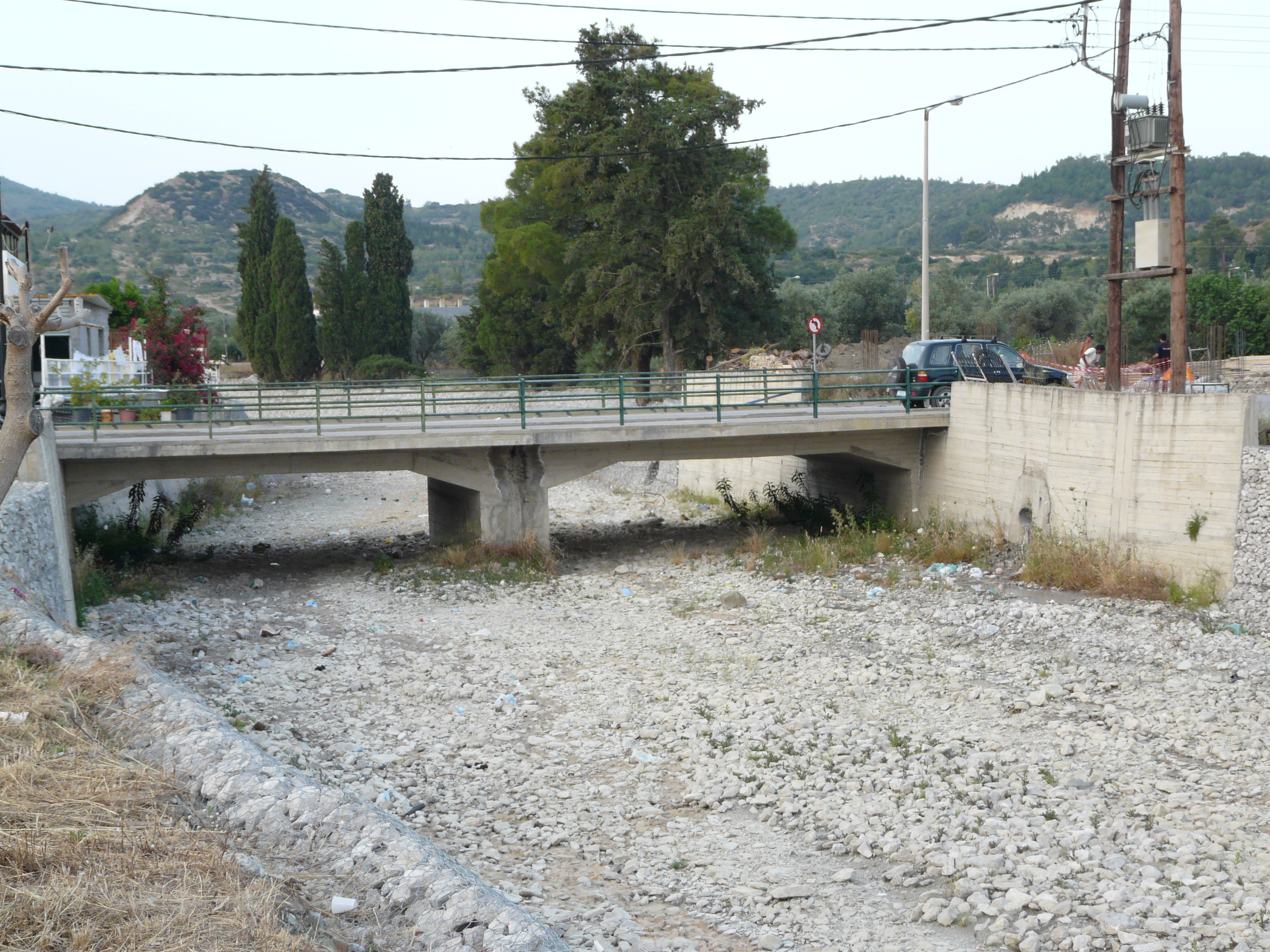 Lardos, Rhodes